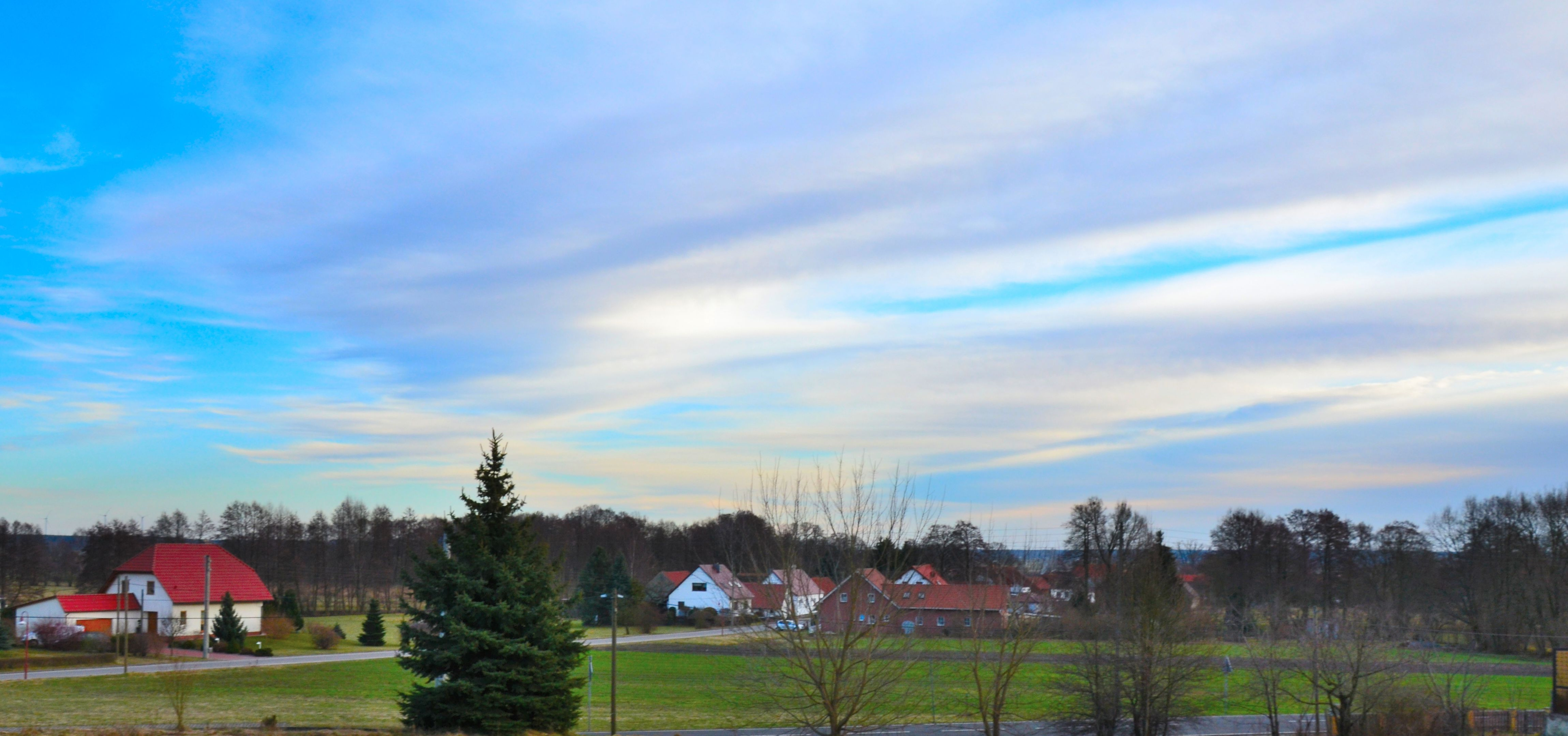 Dorfblick auf Naundorf vom Waldesrand